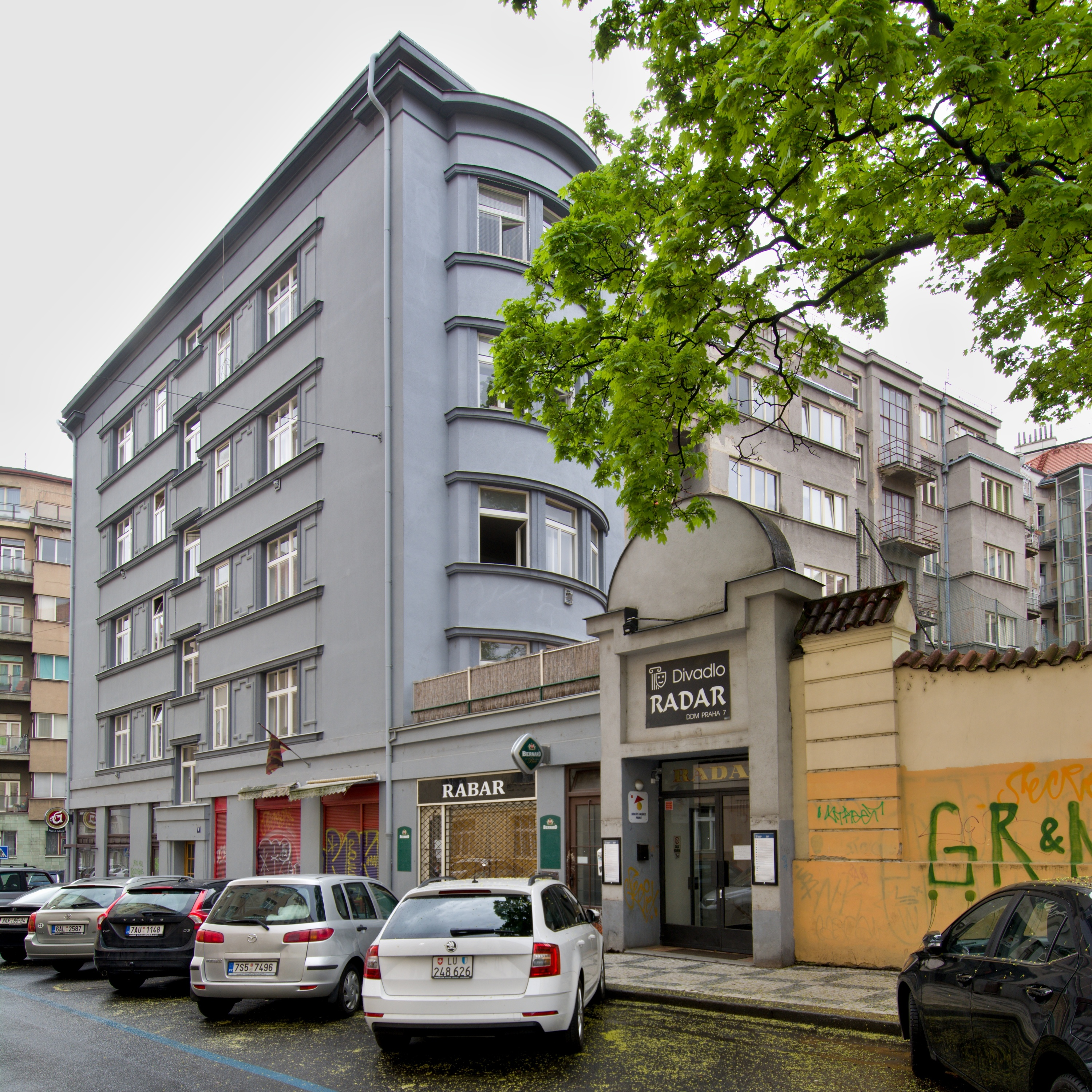 Divadlo Radar, ulice Pplk.Sochora 9, Praha 7, Holešovice. Zřizovatel: Dům dětí a mládeže Praha 7